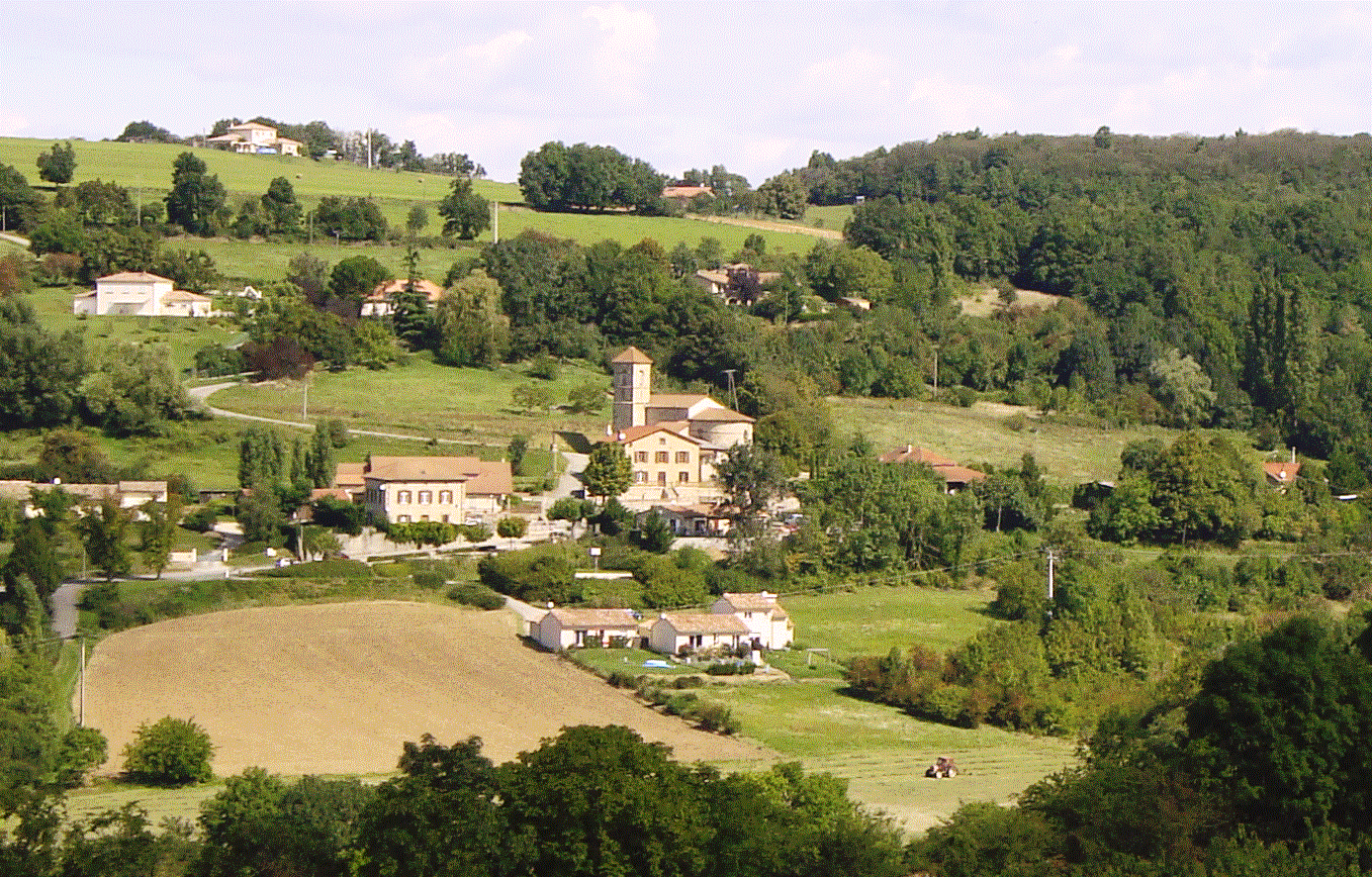 le village du Chalon